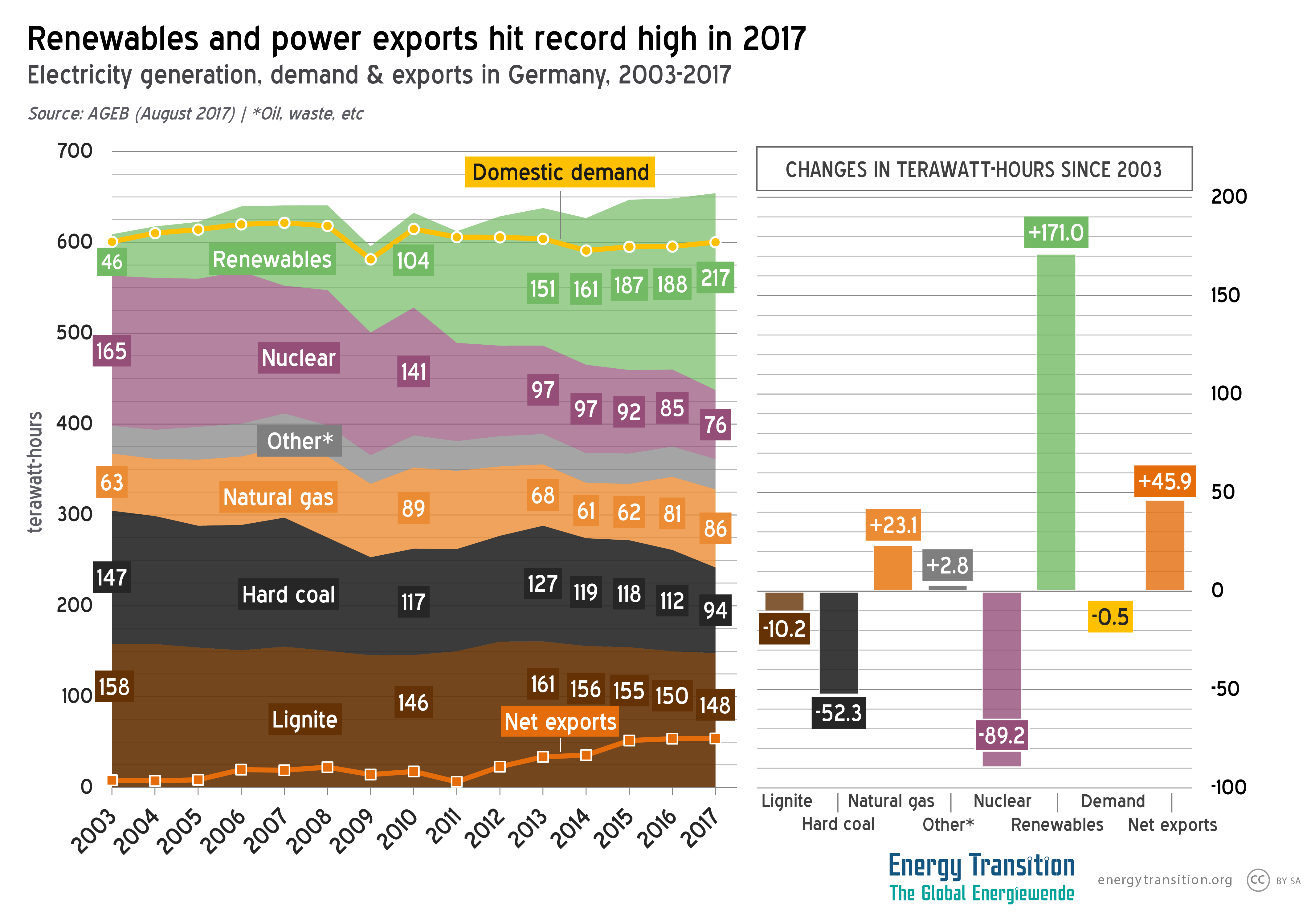 Development of German power production and electricity exports, 2003-2017